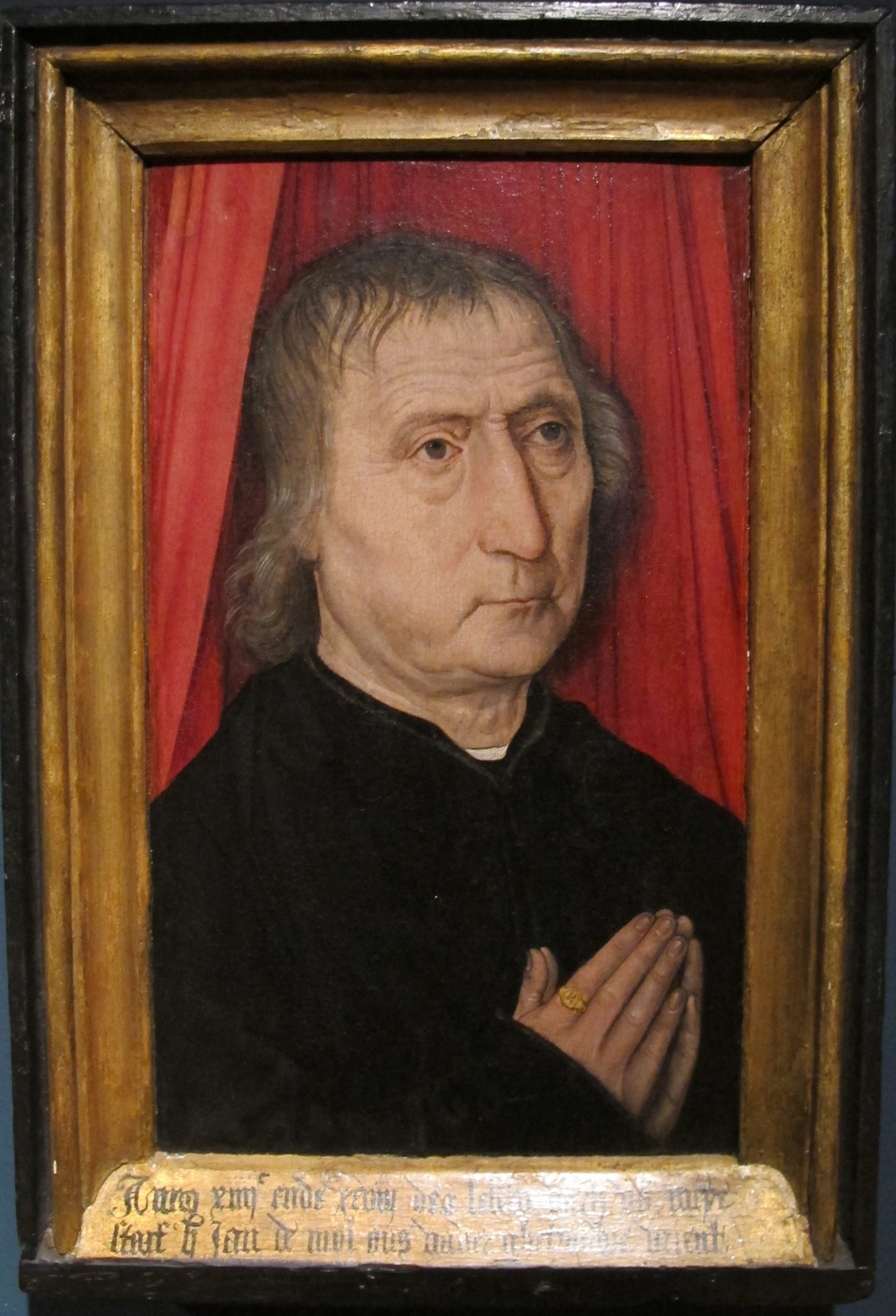 Maestro della gilda di san giorgio di malines, jan de mol, 1498 ca.